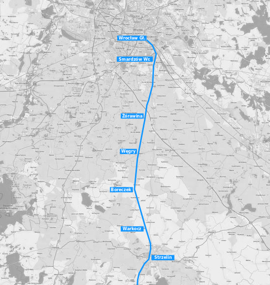 Przebieg linii kolejowej Wrocław - Strzelin